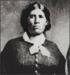 Maxima Antonio Ynita